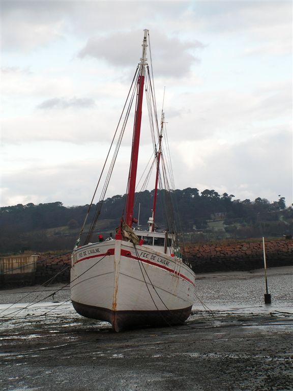 La gabare Fée de l'Aulne en 2005